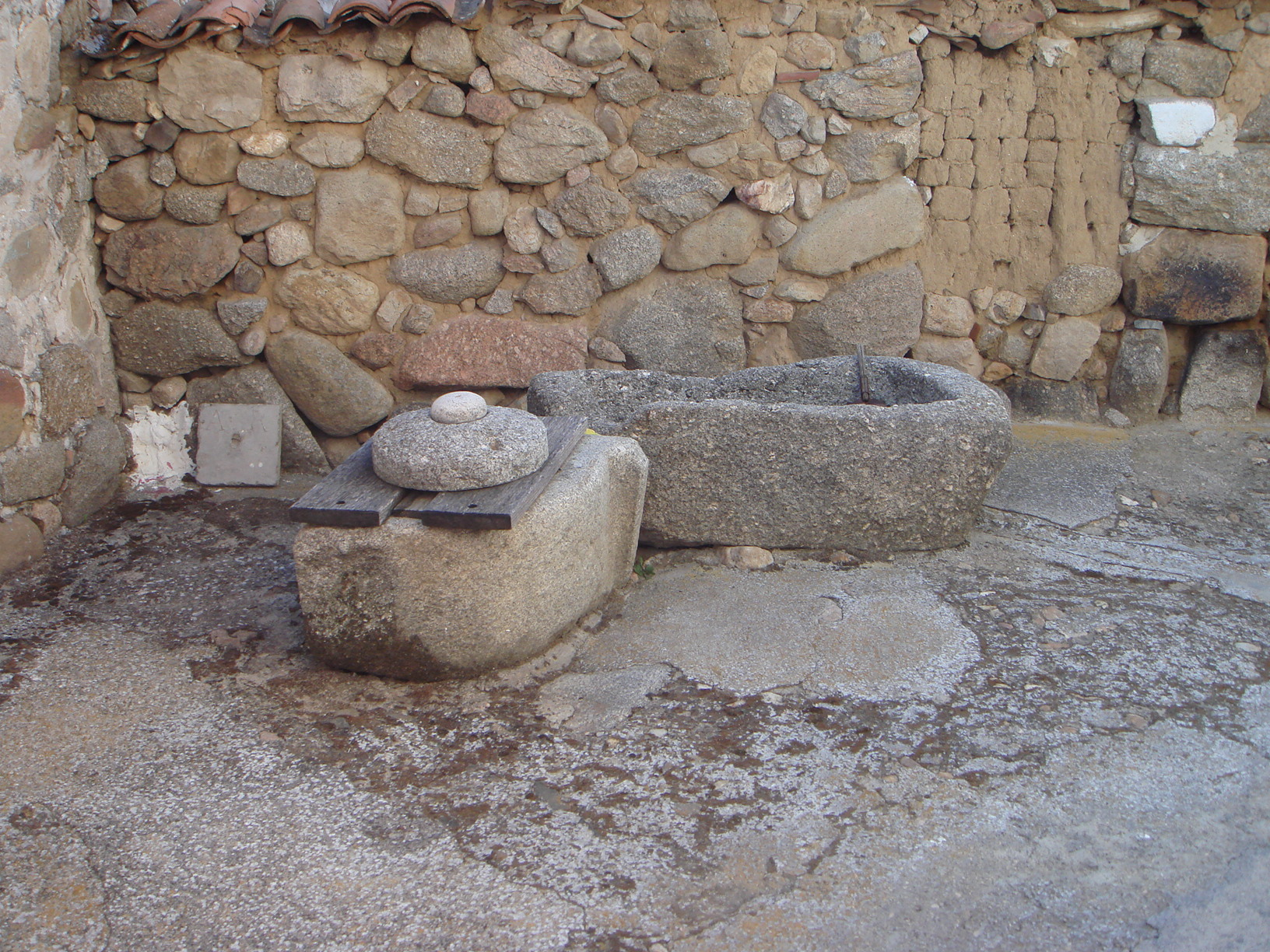 Arquitectura popular. Brocal de pozo y pila de granito en un corral, La Torre (Ávila), España.